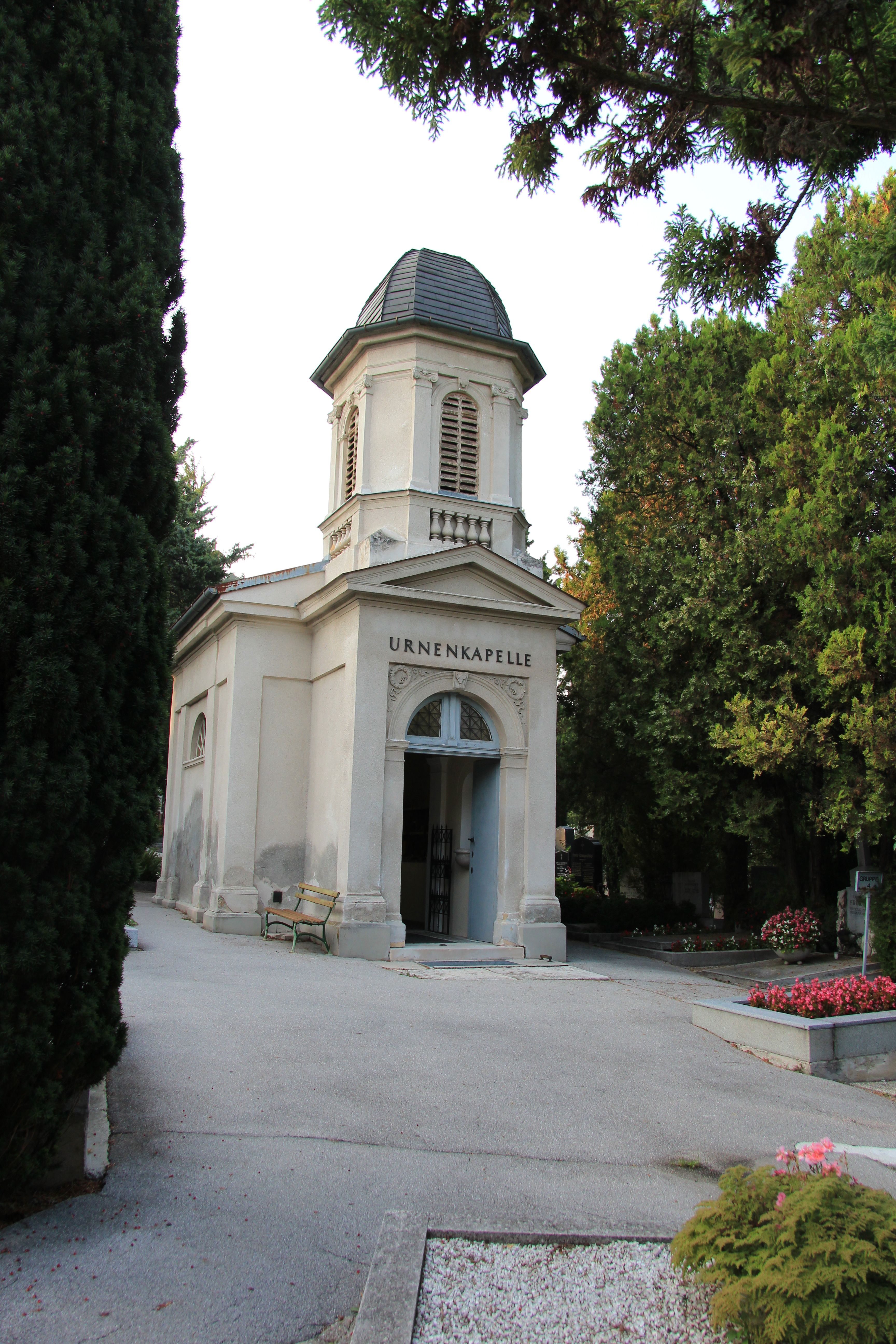 Helenenfriedhof samt Kapelle, Baden, Niederösterreich.